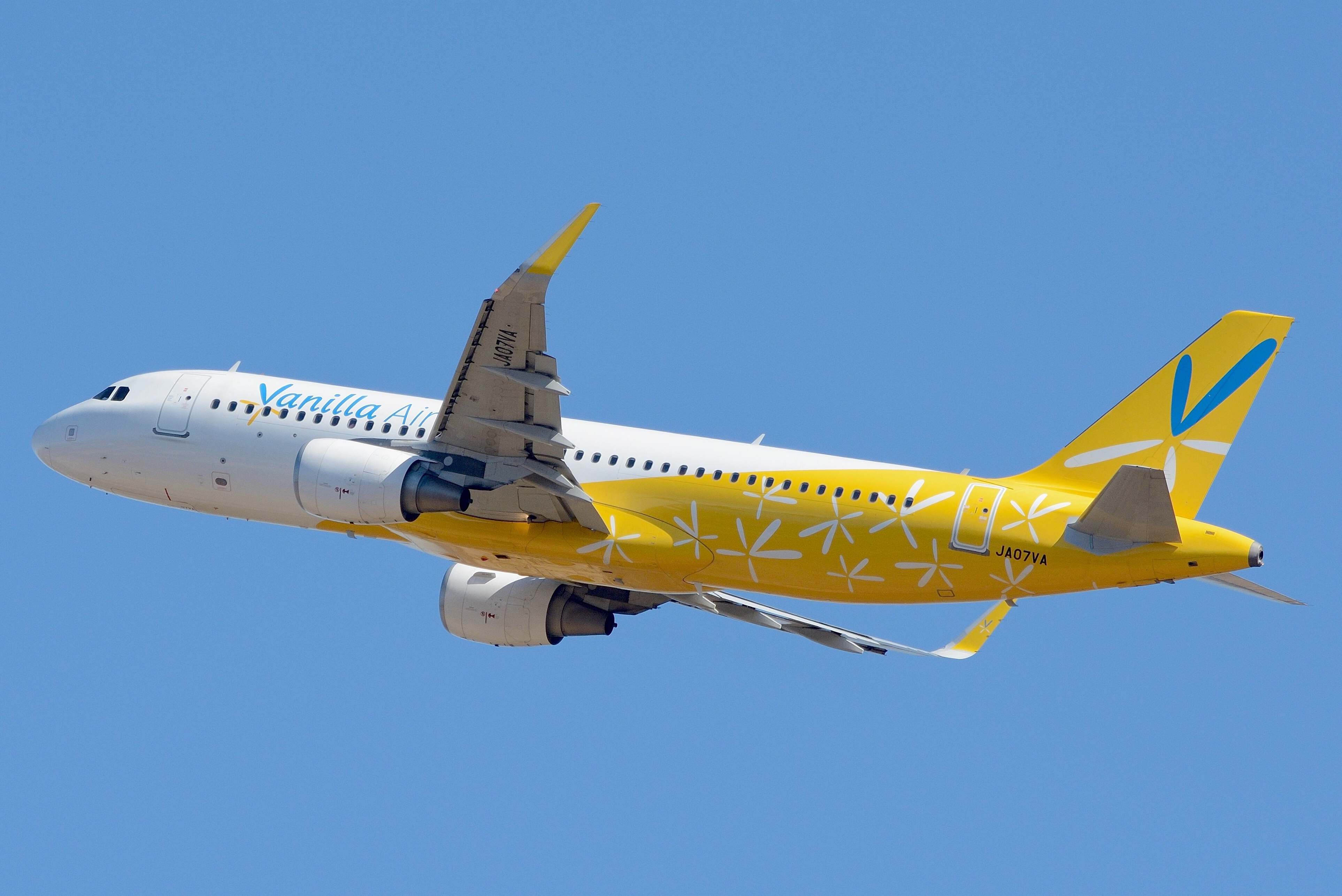 Vanilla Air, Airbus A320-200 JA07VA NRT